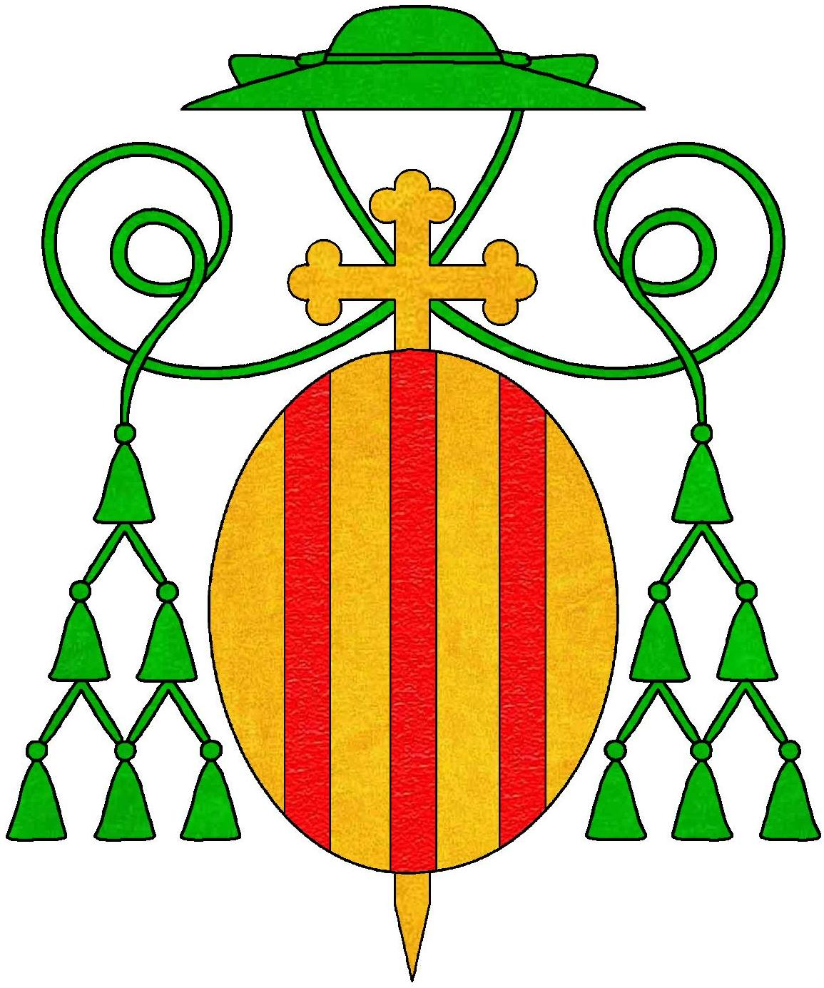 Stemma del vescovo Giovanni da Palazzo